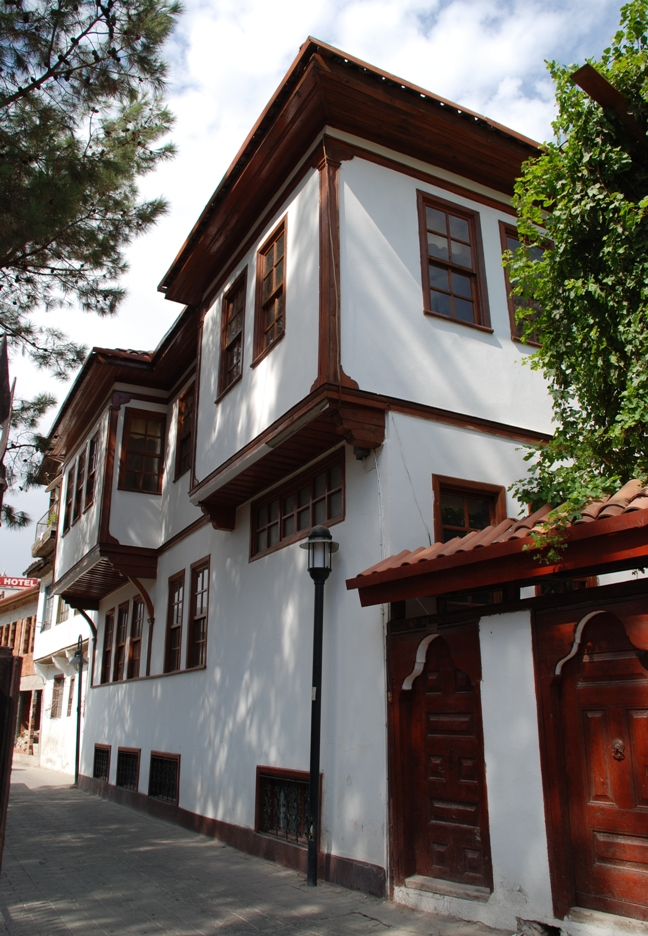 Die Altstadt von Amasya